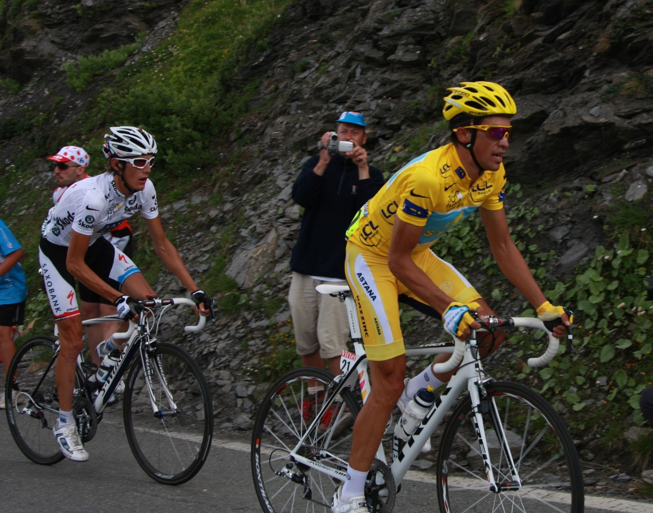 8674 andy en albert